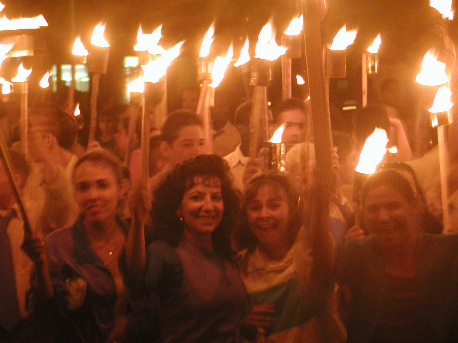 Marcha o desfile de las antorchas. Se celebra en todo el país.